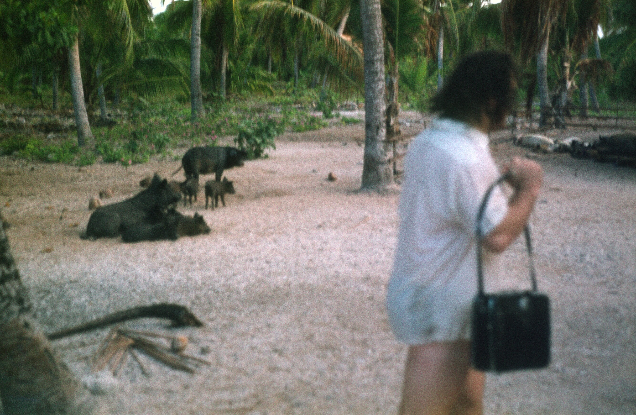 Schweinezucht auf Astove Island, 1973